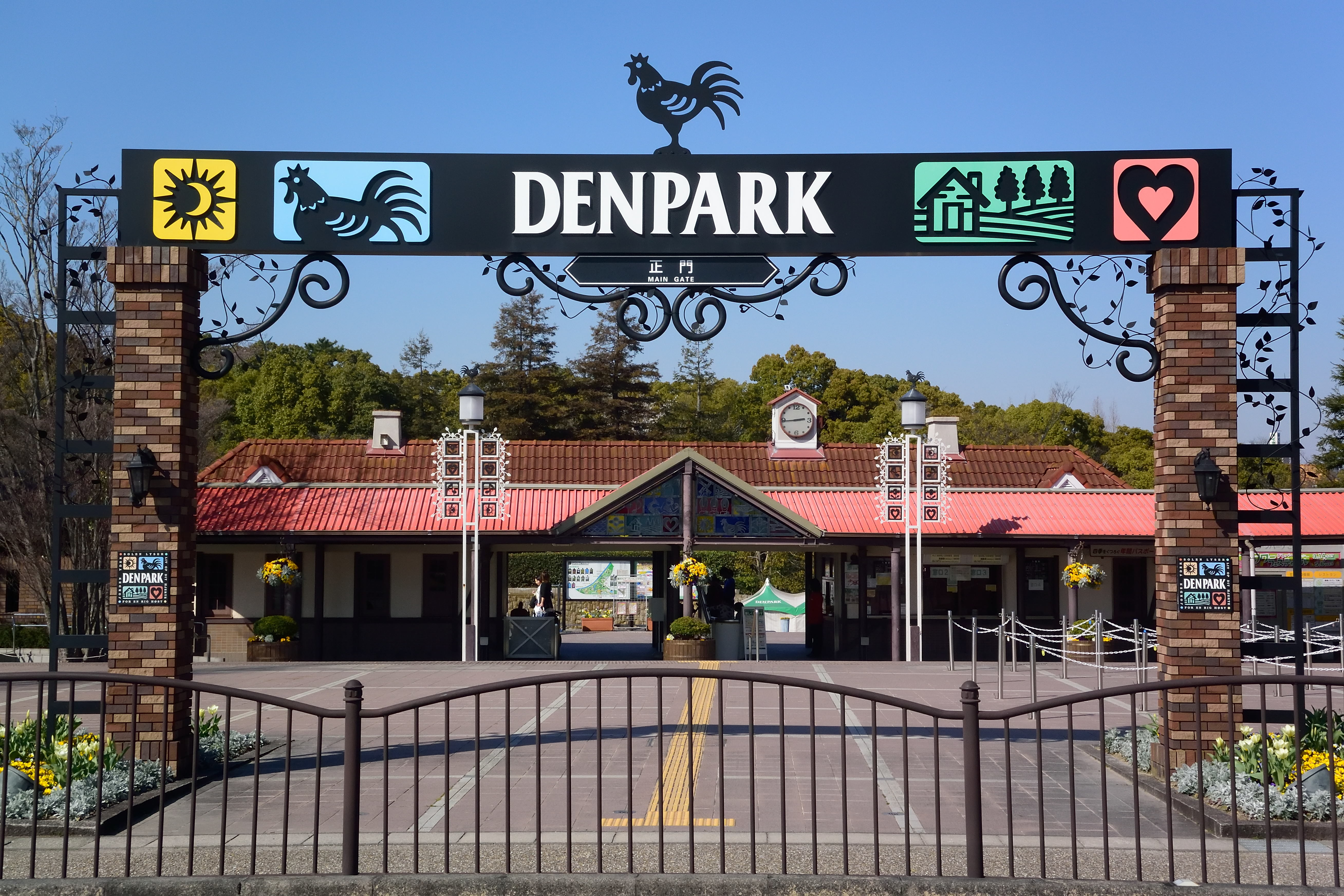 愛知県安城市の安生産業文化公園デンパーク正門。